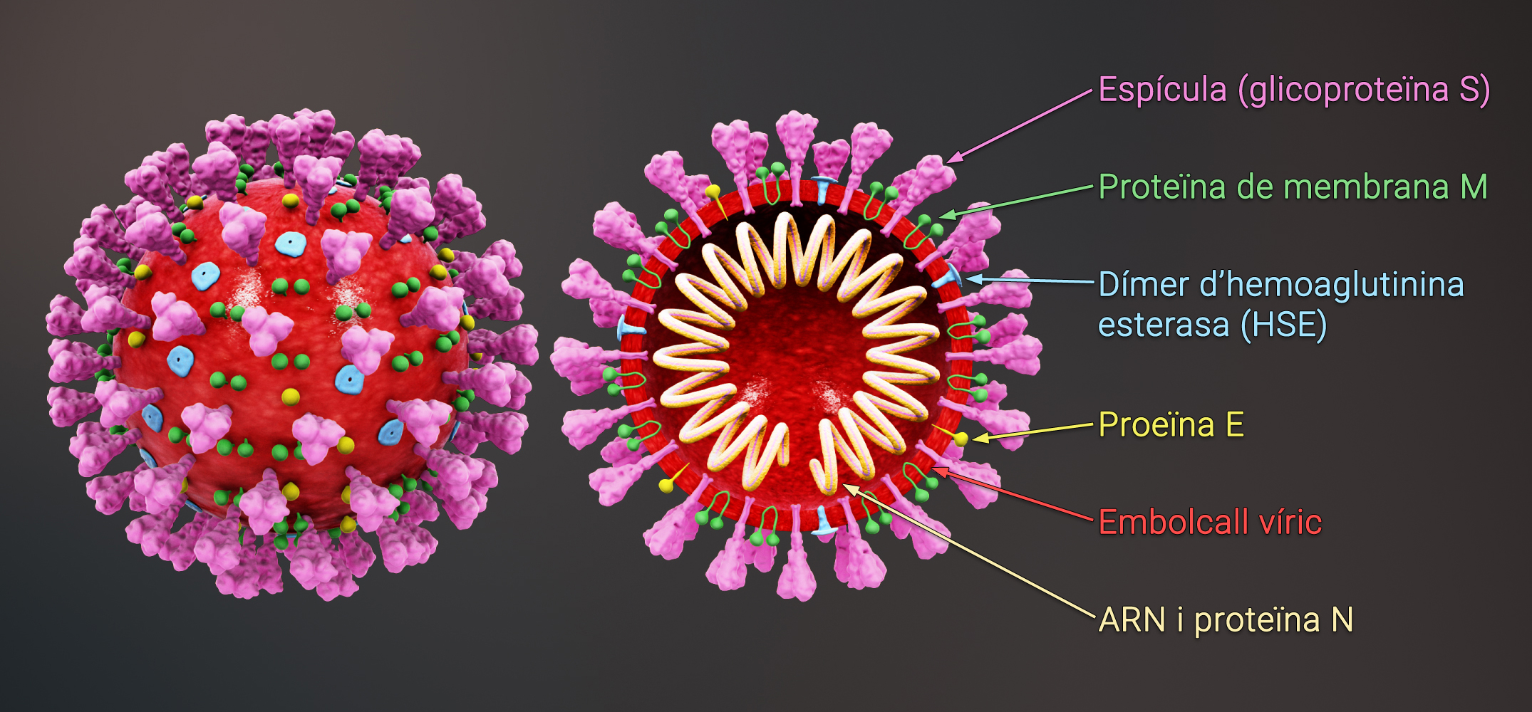 Animació 3D de l'estructura vírica del Coronavirus